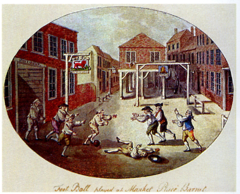 Football à Barnet, gravure de 1750.